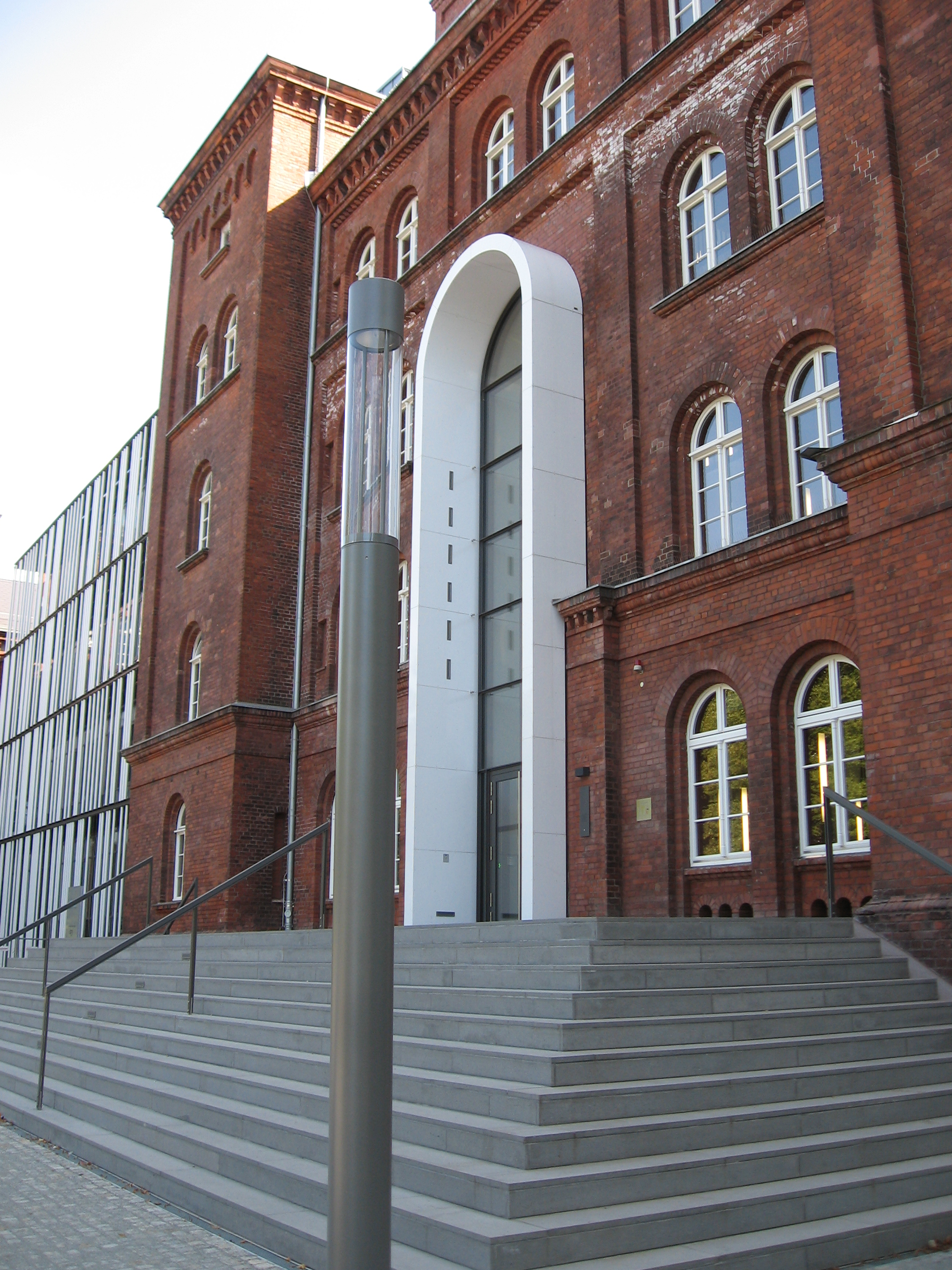 Hauptgebäude der Technischen Universität der Freien und Hansestadt Hamburg.